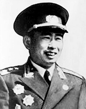 1955年宋任穷授勋图